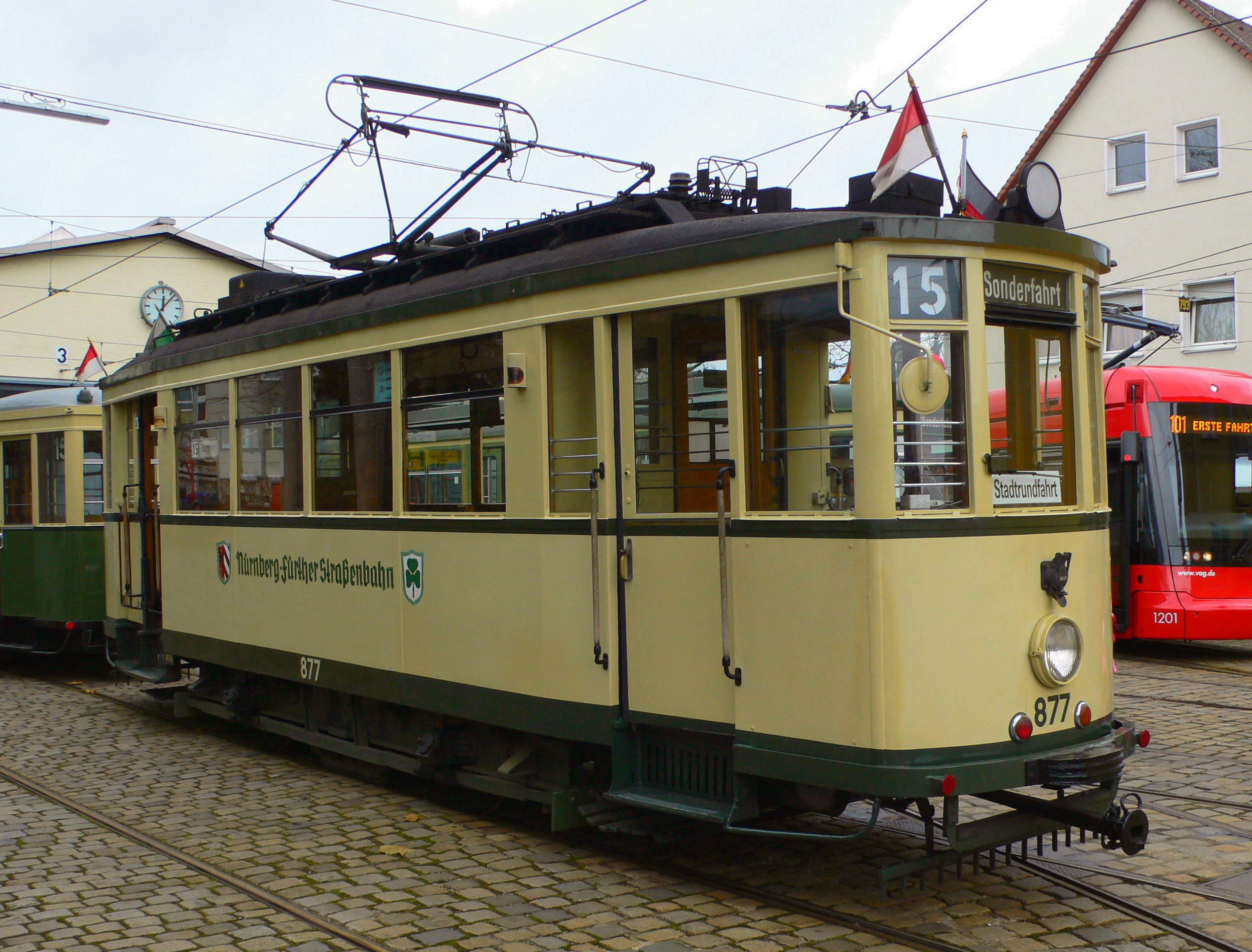 Triebwagen 877 der Nürnberg-Fürther Straßenbahn